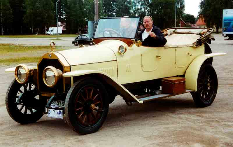 Benz 33/75 PS Sport-Doppelphaeton 1912